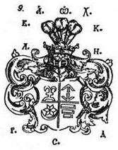 Родавыя гербы XVI i XVII стст. Віленская школа.